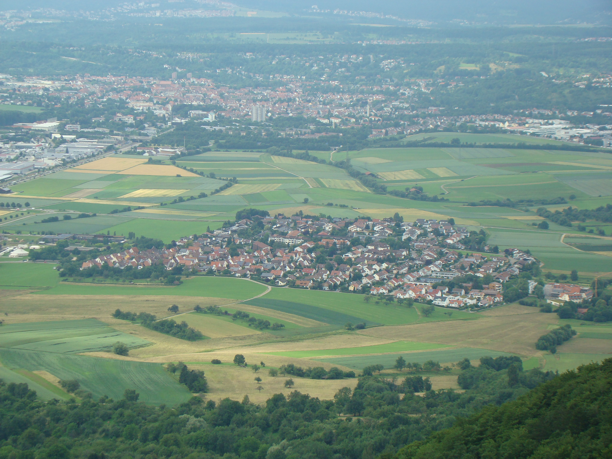 Blick von der Teck auf Dettingen unter Teck und Kirchheim